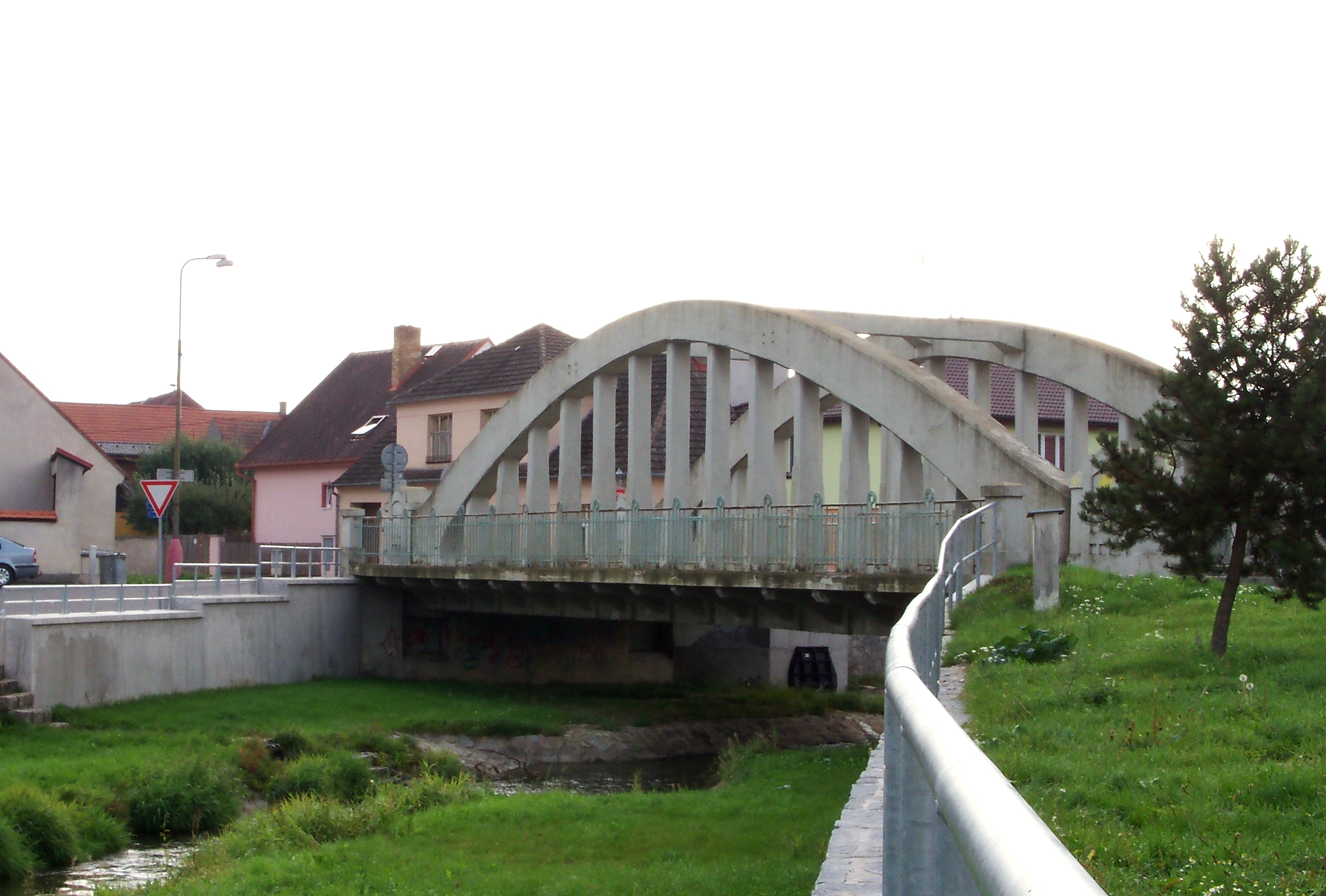 Silniční most č. 135-012 (Soběslav), přes Černovický potok, Soběslav